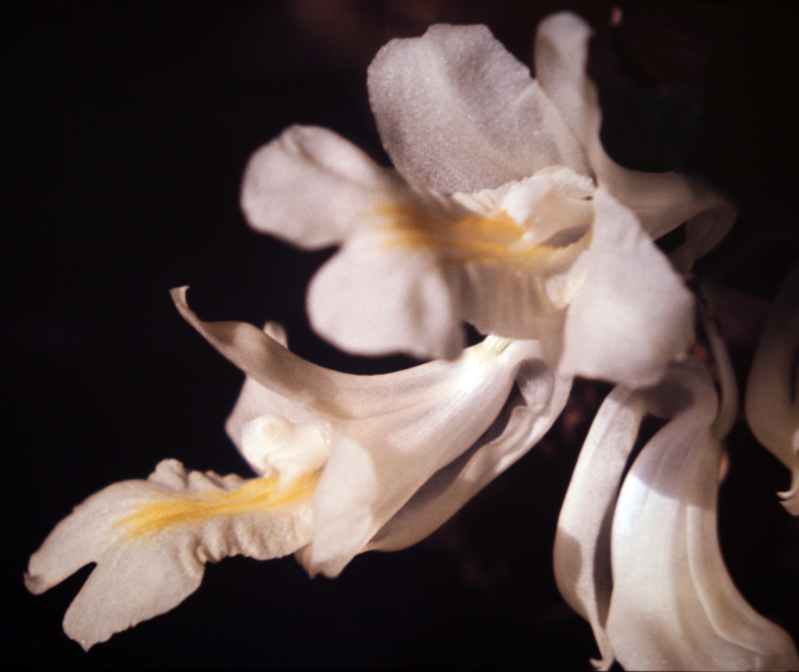 Rodriguezia candida, Suriname.